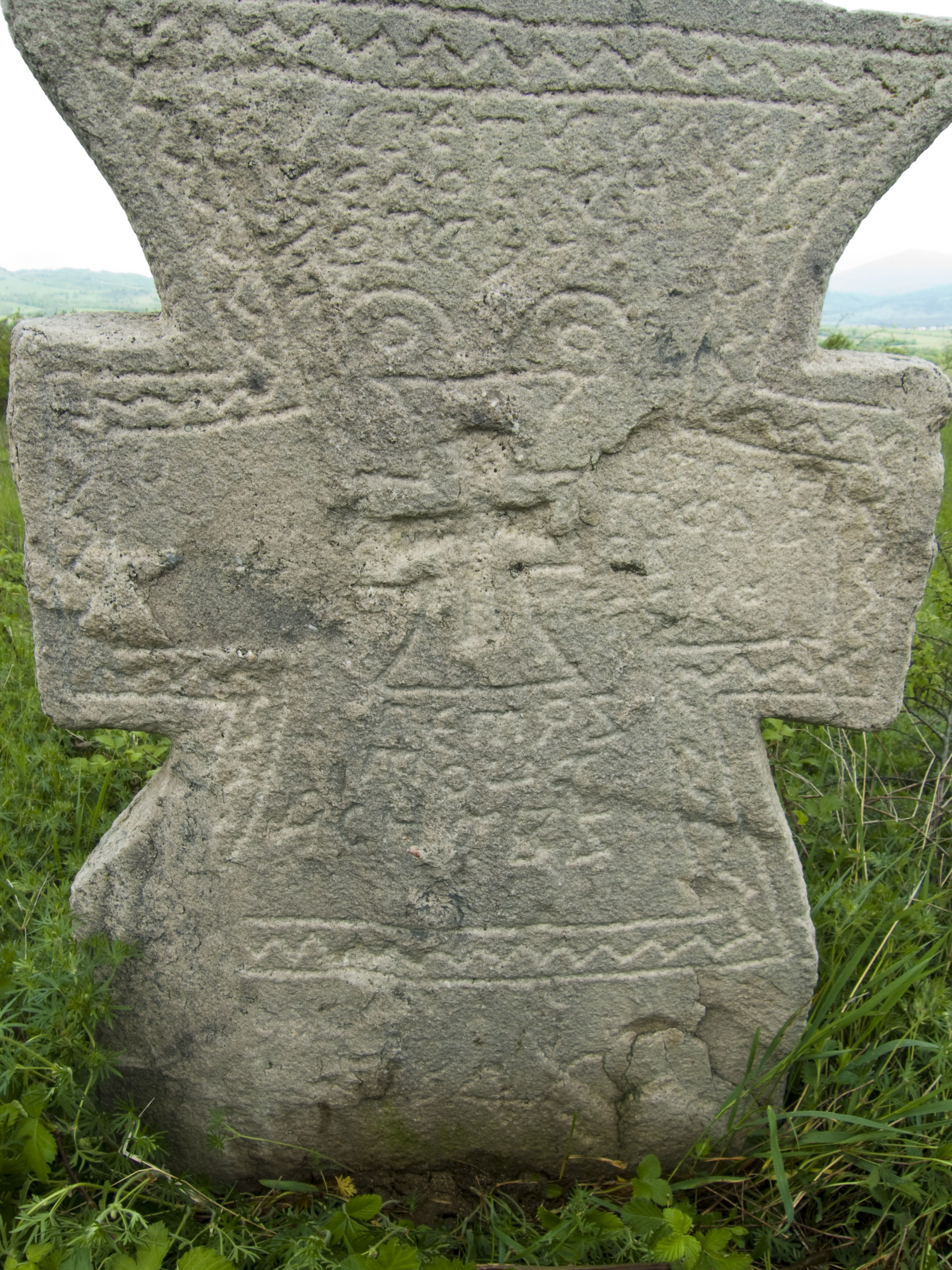 Побит кръст в лозята на с. Спанчевци. На Илинден там се е правел курбан.